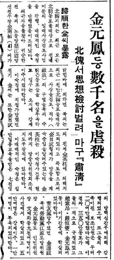 金元鳳粛清 : 金元鳳(김원봉)등 數千名(수천명)을 虐殺(학살)